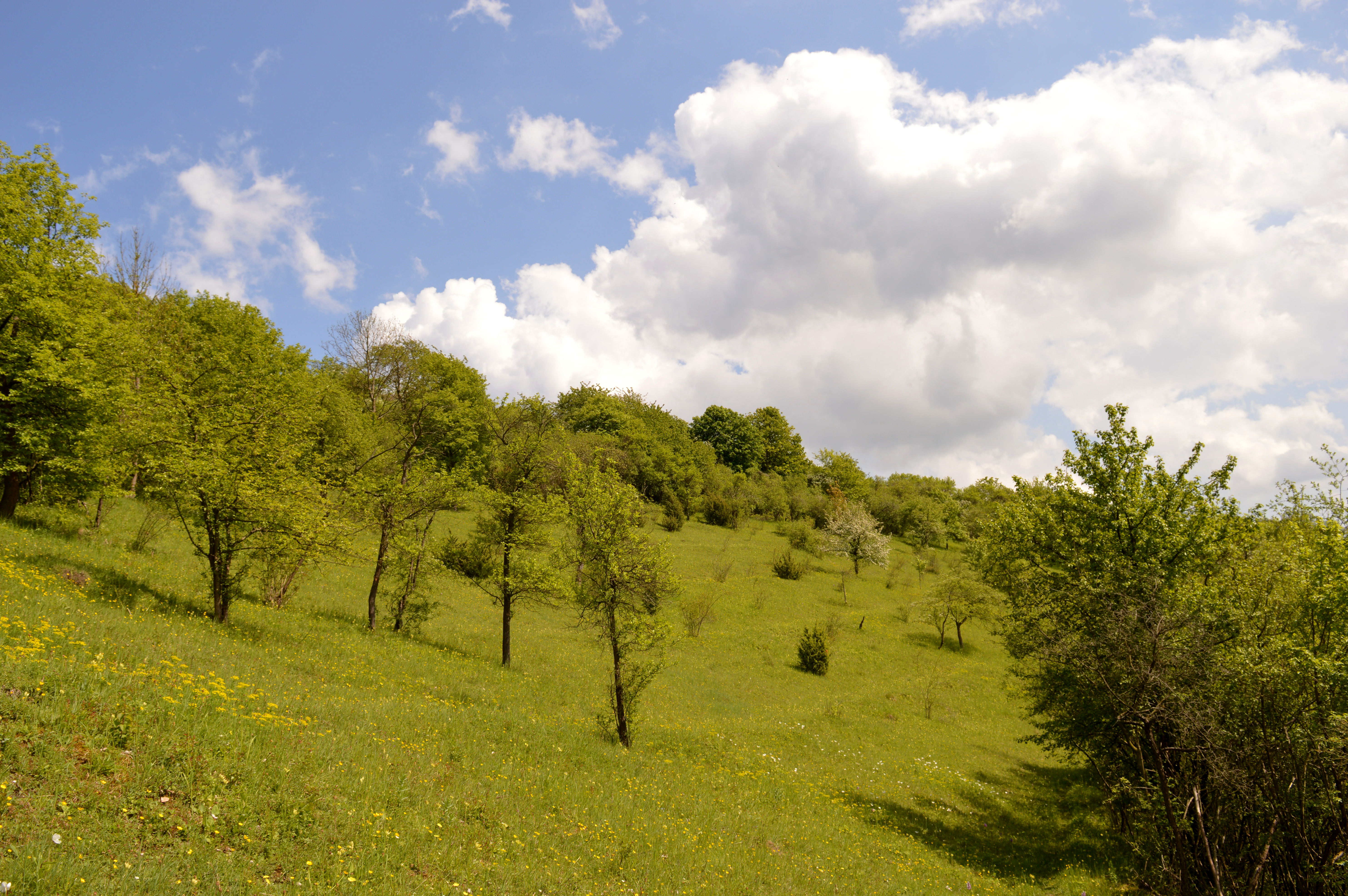 Naturschutzgebiet Schiefer Holzer Berg (29)